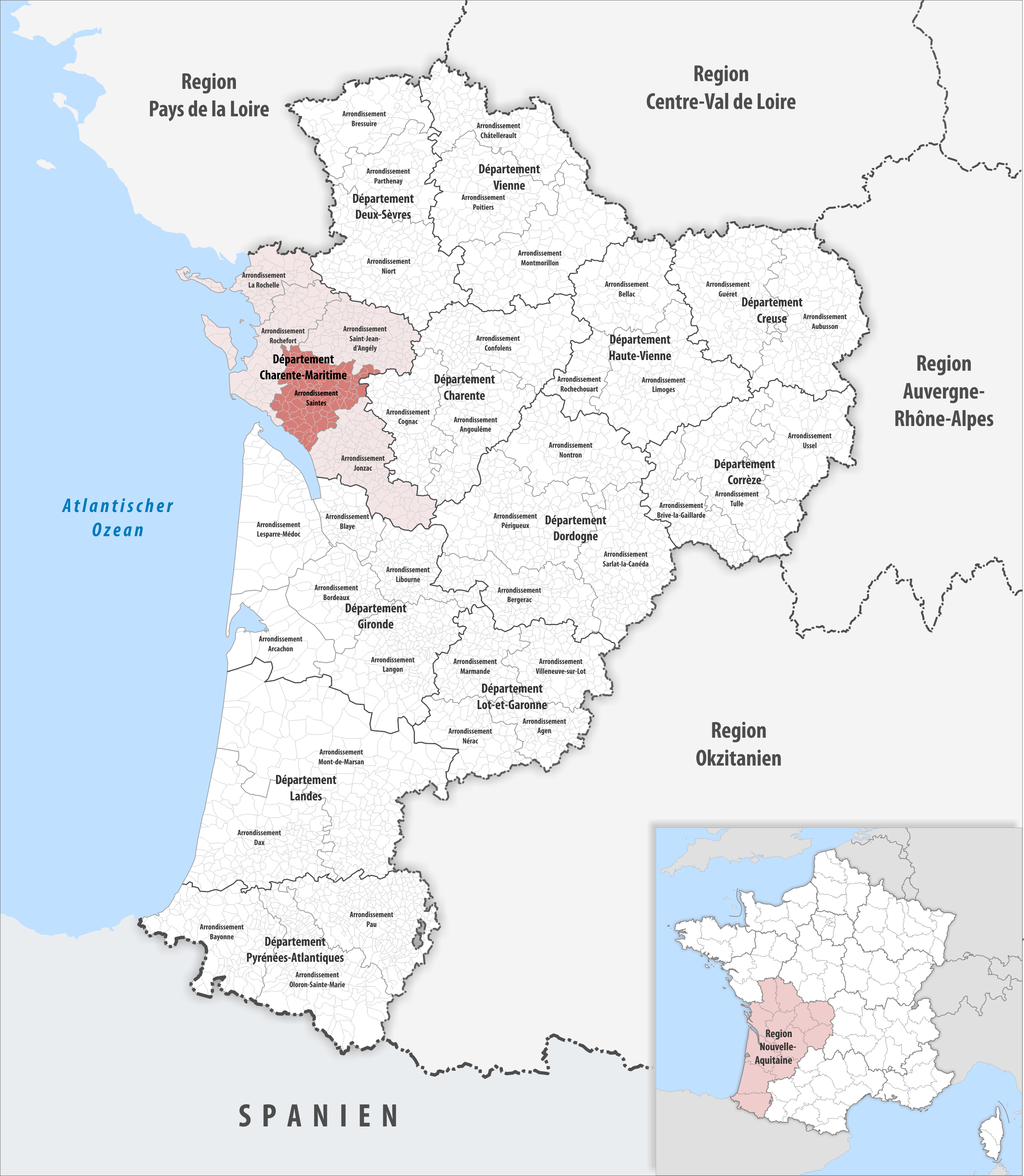 Lage des Arrondissements Saintes